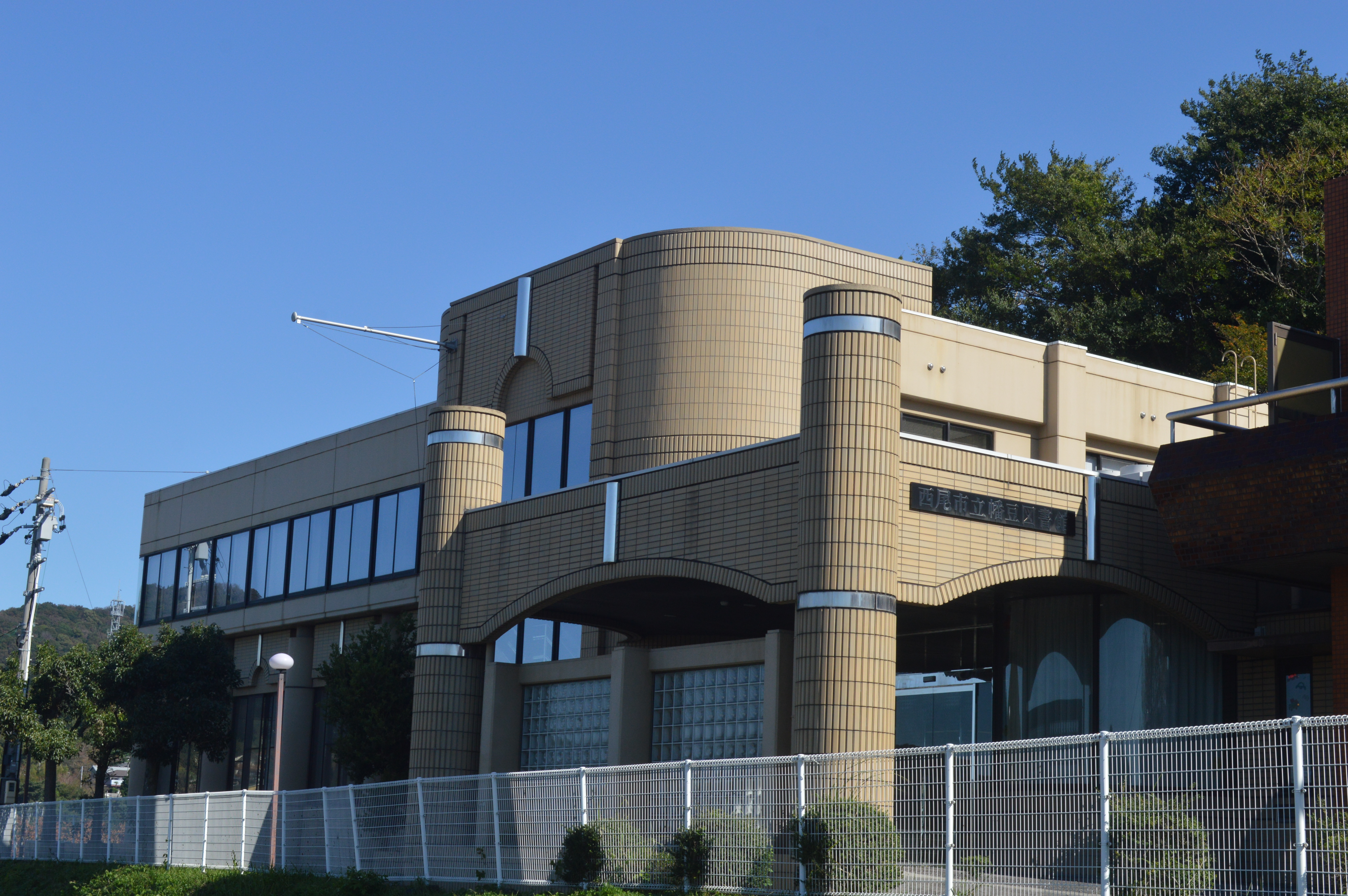 愛知県西尾市の西尾市立幡豆図書館。